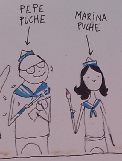 Pepe i Marina Puche, a la falla "La Mar Salà" de 2015.